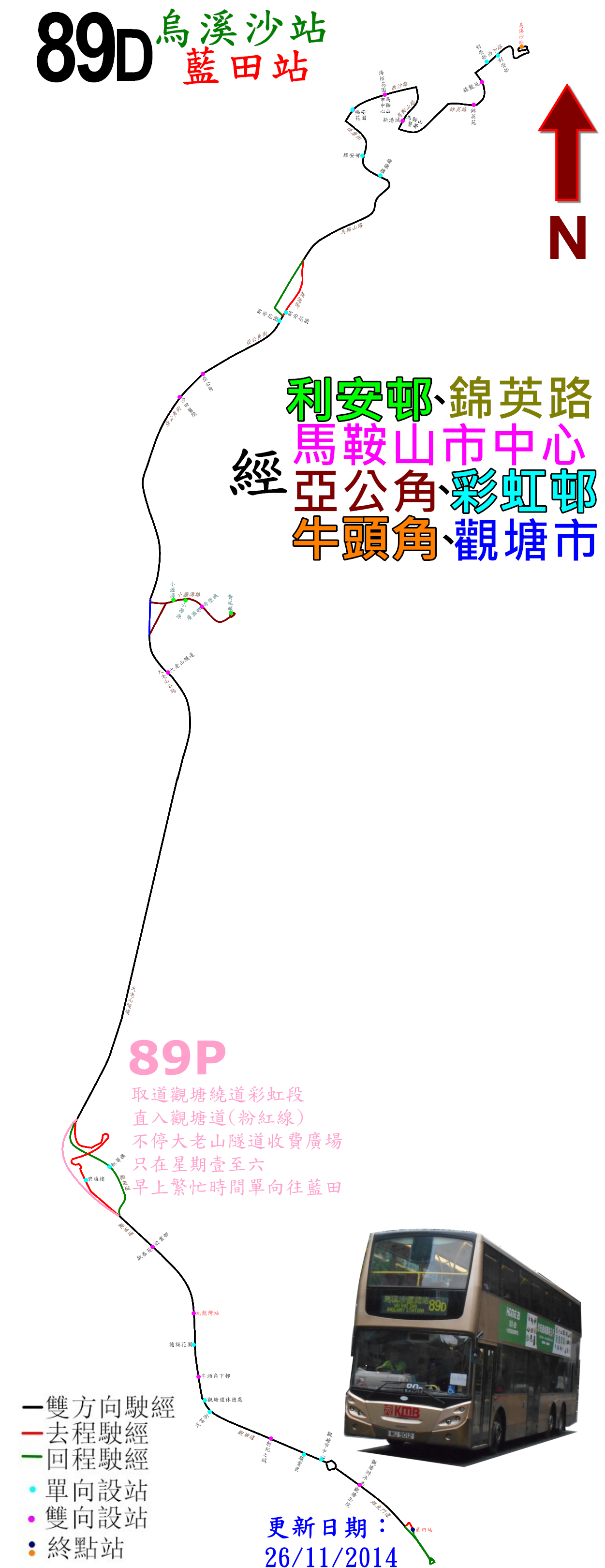 九巴89D線的走線圖